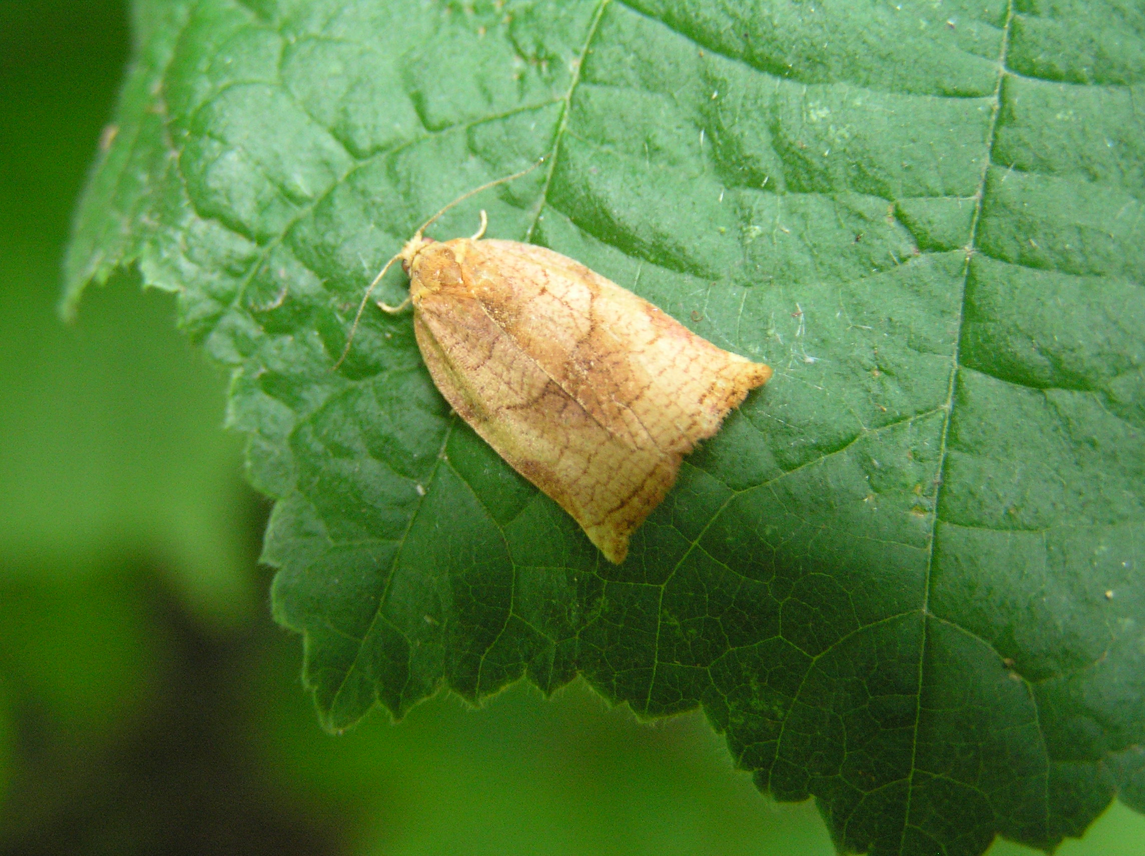 Archips podana female